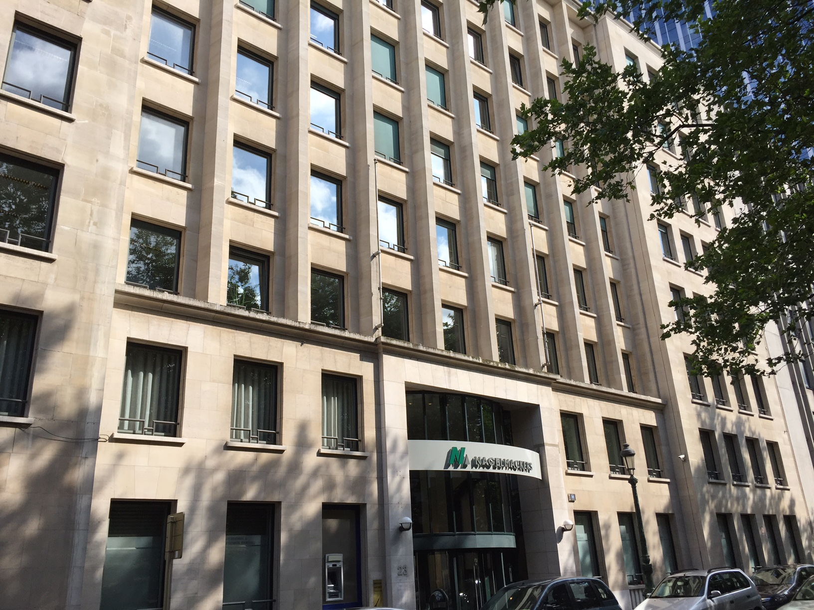 HQ Nagelmackers Brussel